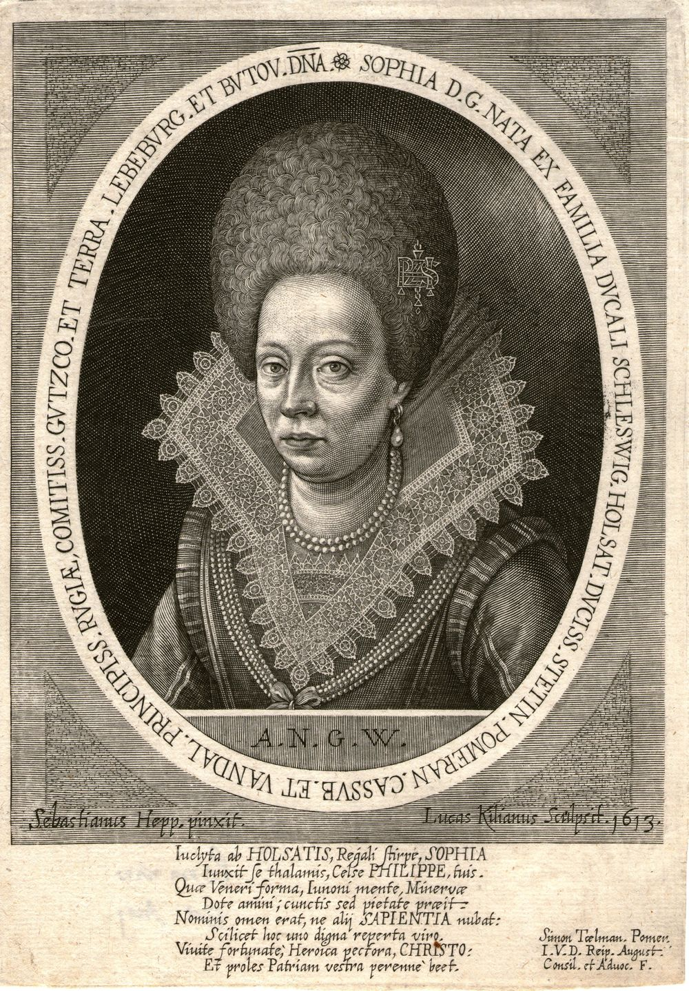 Zofia pomorska, żona Filipa II szczecińskiego - miedzioryt